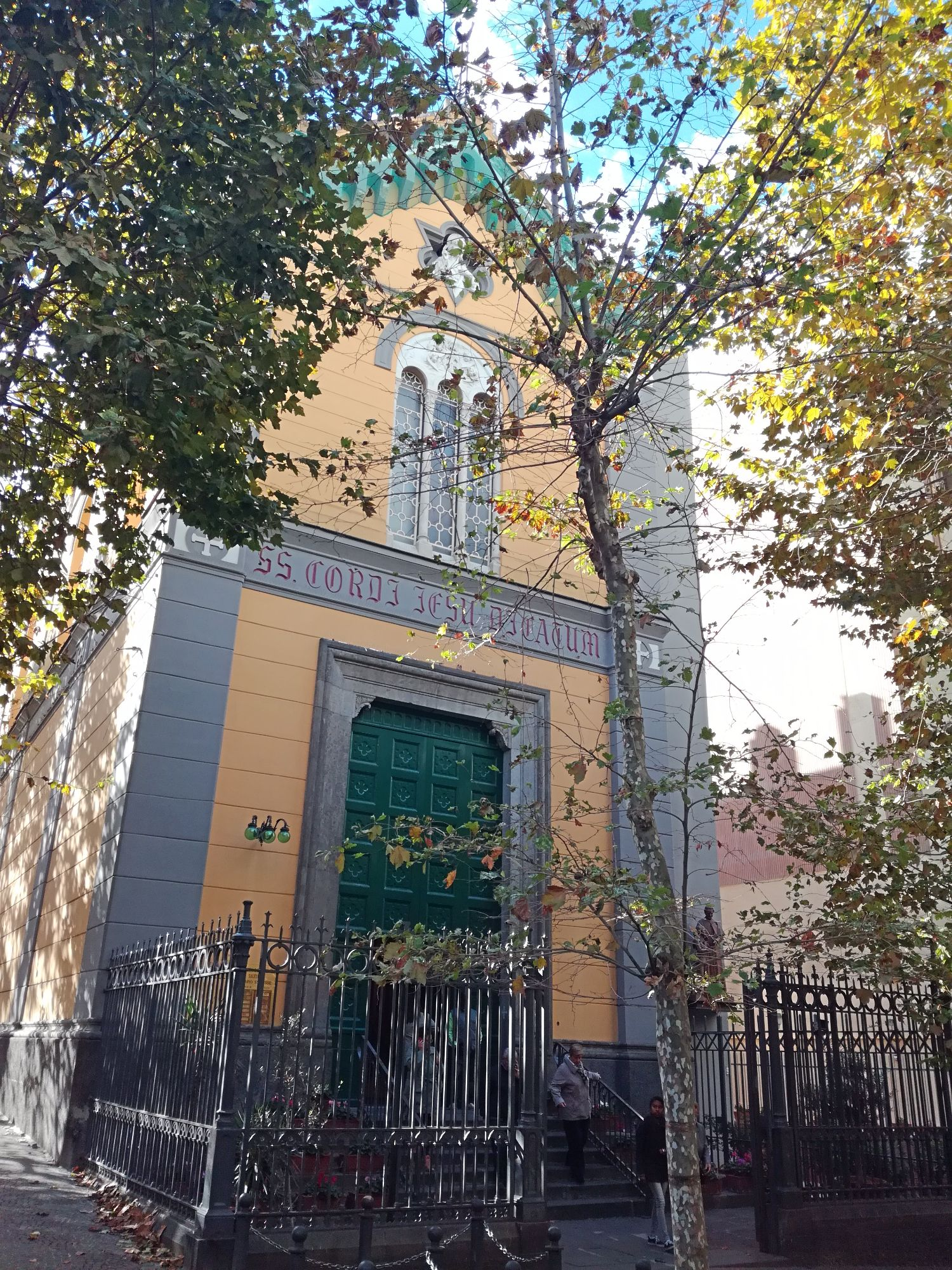 Chiesa del Sacro Cuore dei Salesiani (Napoli)